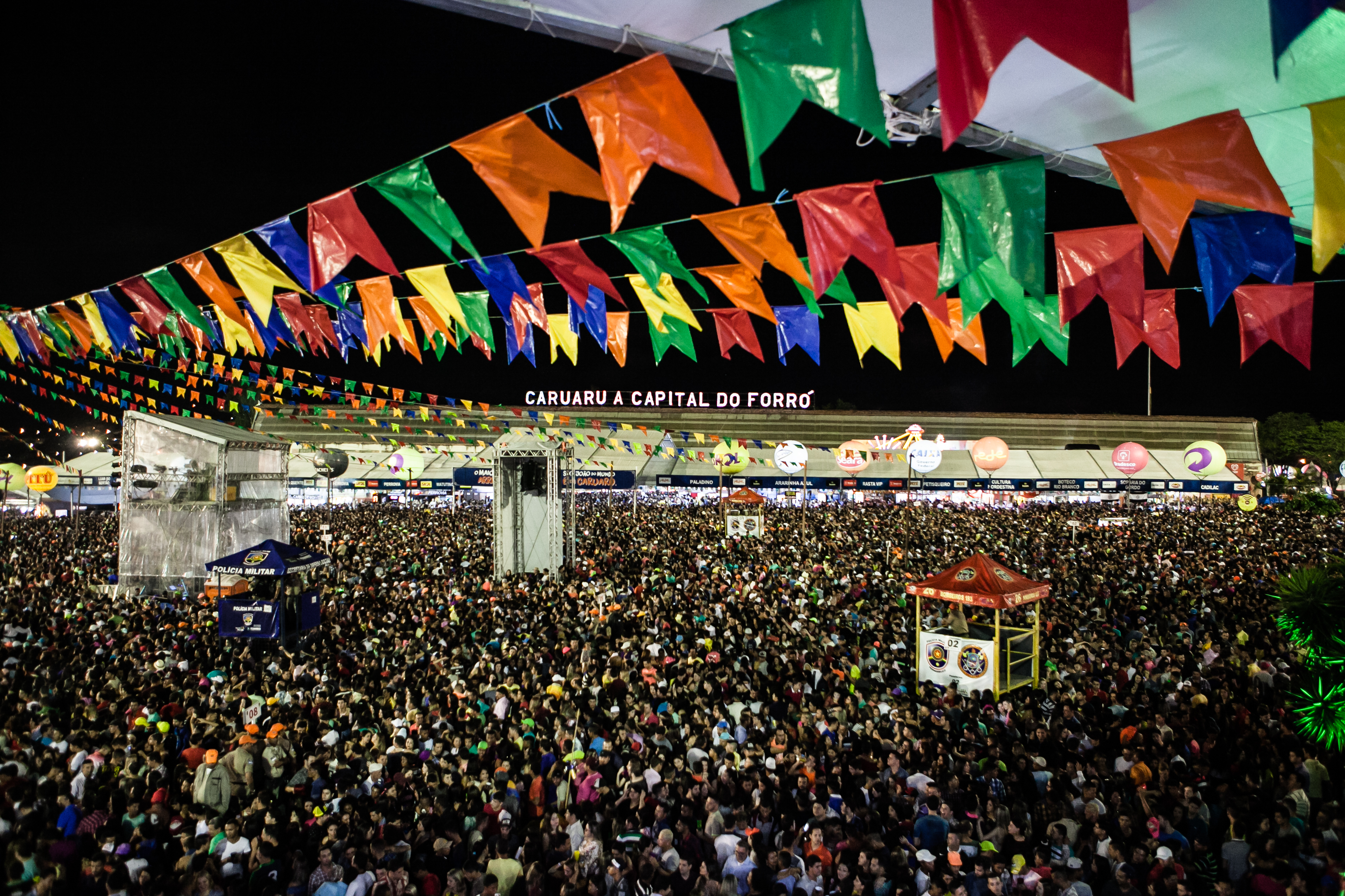 18-06-2016 Ministro da Cultura, Marcelo Calero, conhece o São João de Caruaru. Fotos: Janine Moraes/MinC